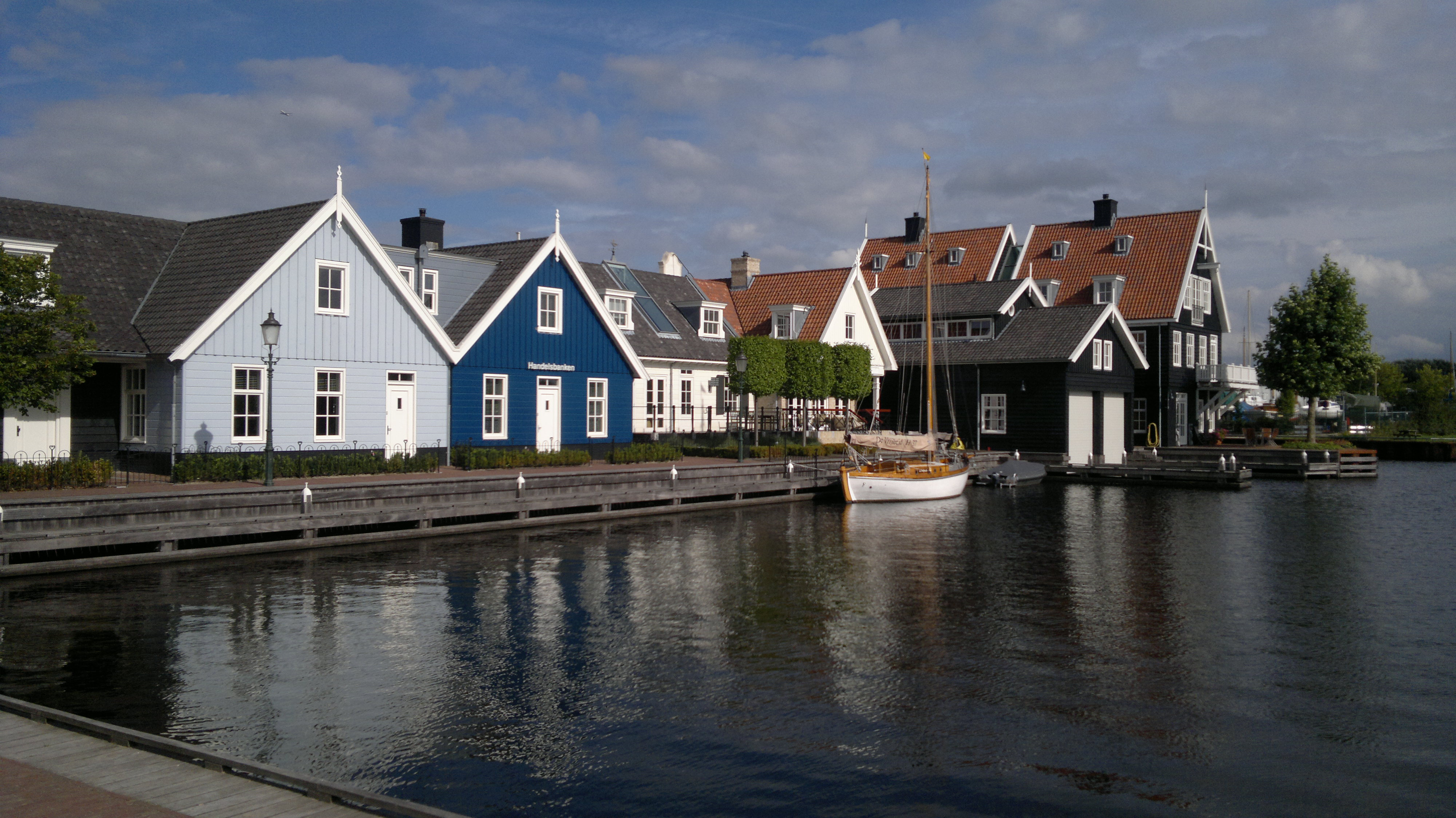 Nautisch Kwartier